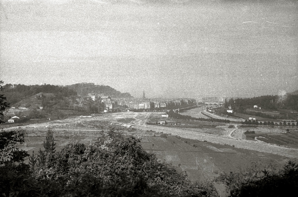 Vista de la zona de Amara.